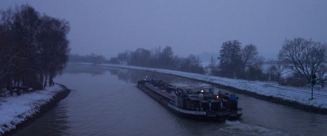 Dortmund-Ems-Kanal im Winter bei Lüdinghausen, eigenes Bild, GFDL 15:12, 7. Aug 2004 Stahlkocher 640 x 267 (19797 Byte) (Doirtmuns Ems Kanal im Winter bei Lüdinghausen, eigenes Bild, GFDL)